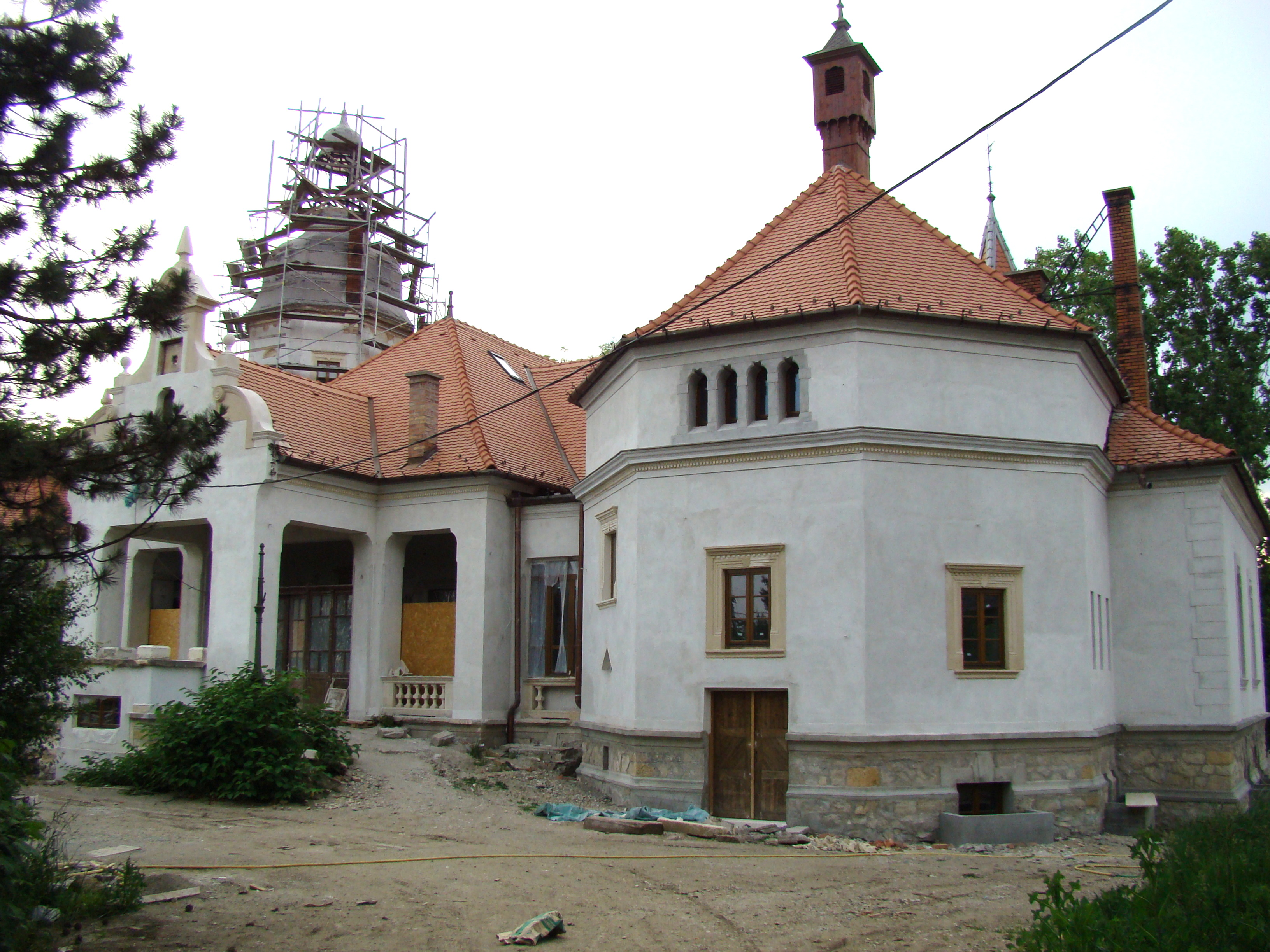 Castelul Banffi, sat aparținător Sâncrai; municipiul Aiud, județul Alba 01